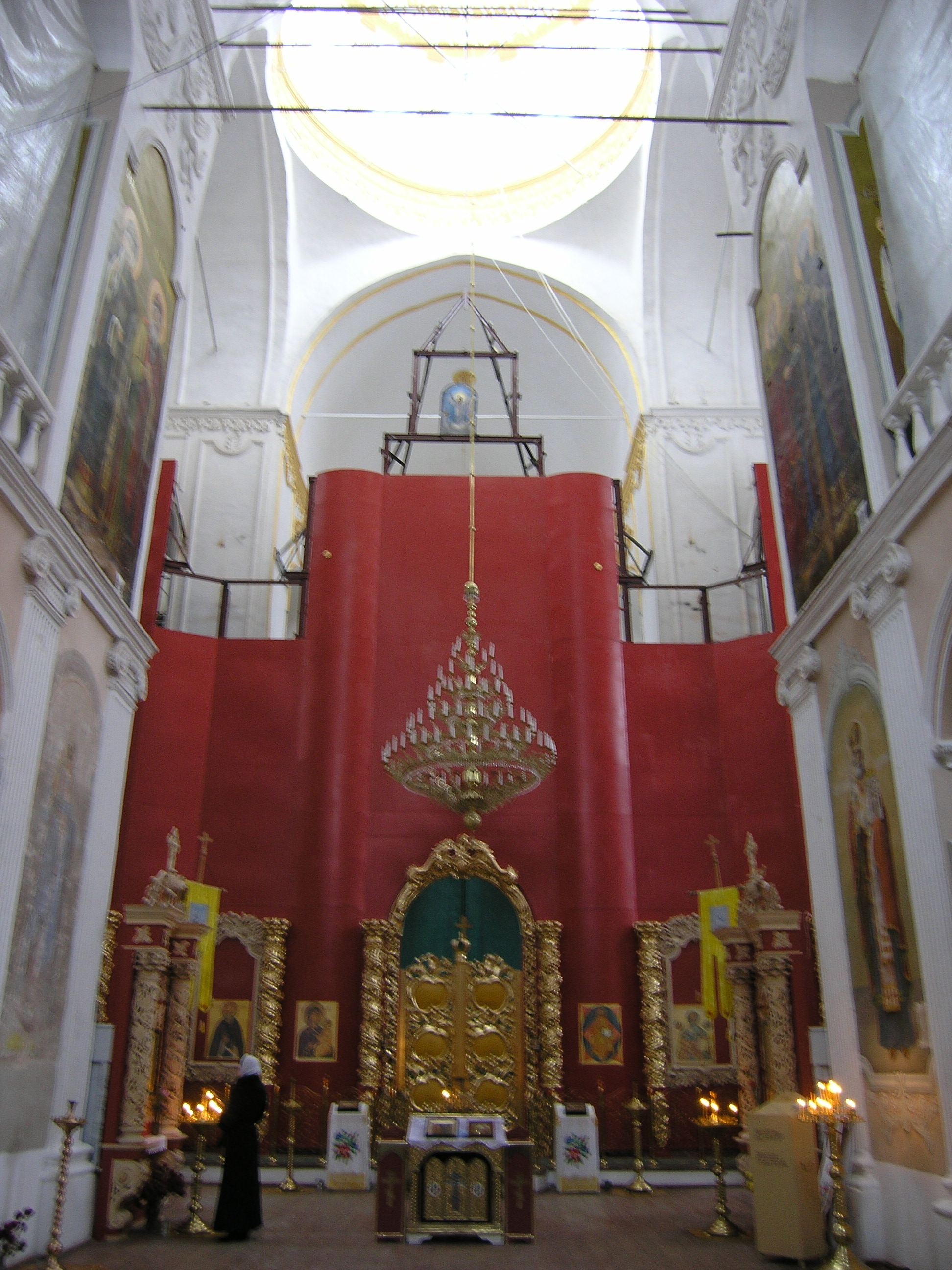 Спасо-Преображенський собор (мур.) , с.Мгар